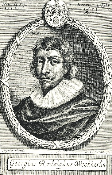 Gesellschaftslyriker Georg Rodolf Weckherlin als englischer Parlamentssekretär.